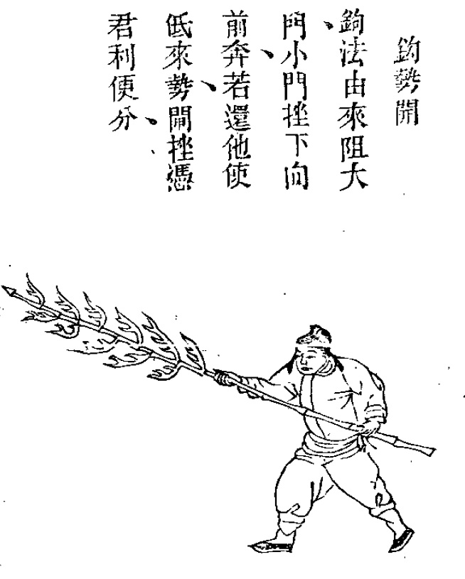 Лансянь. Убэй чжи, XVII век.